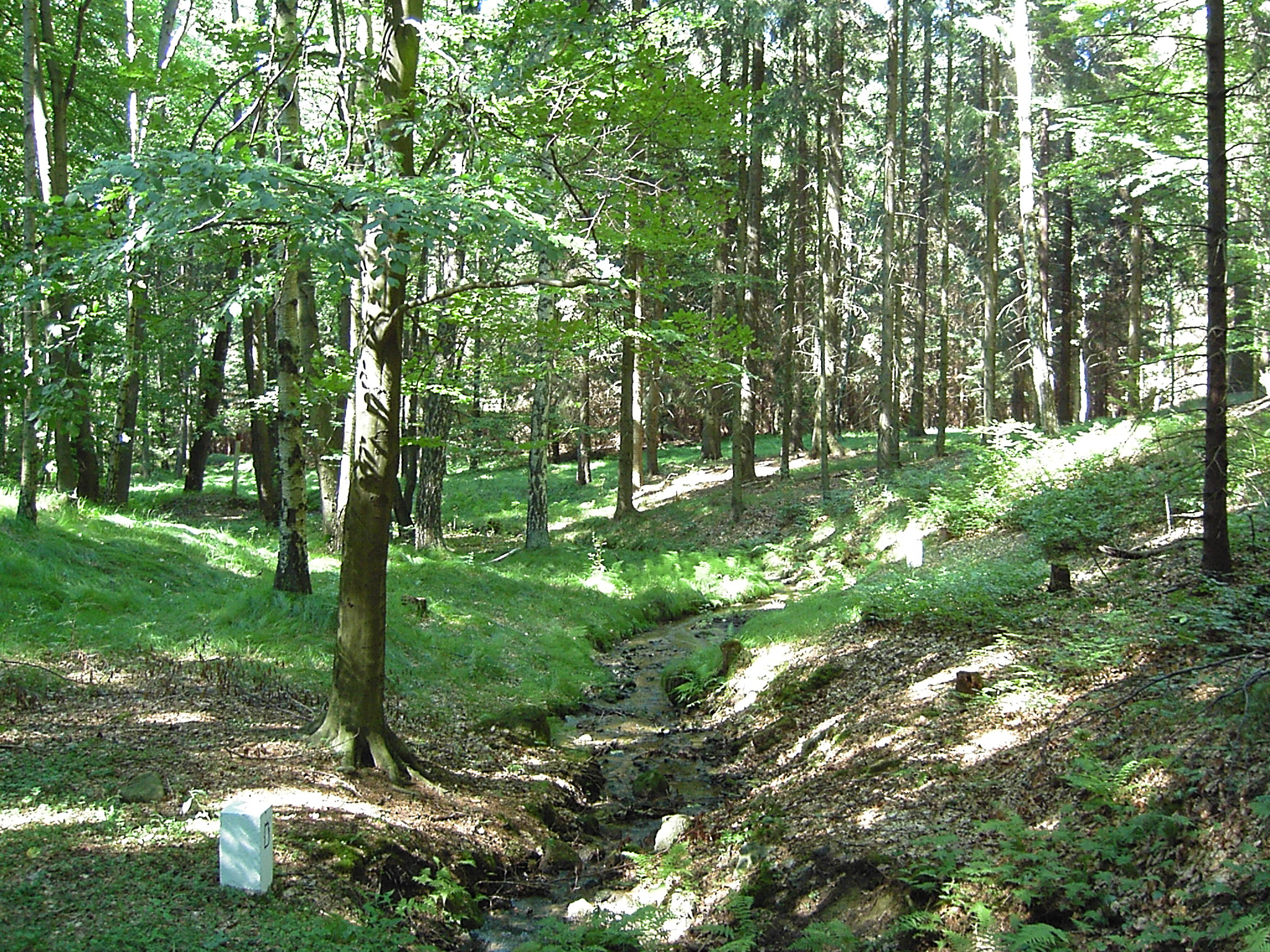 Hraniční potok (Wolsbach), přítok Sebnice, na státní hranici